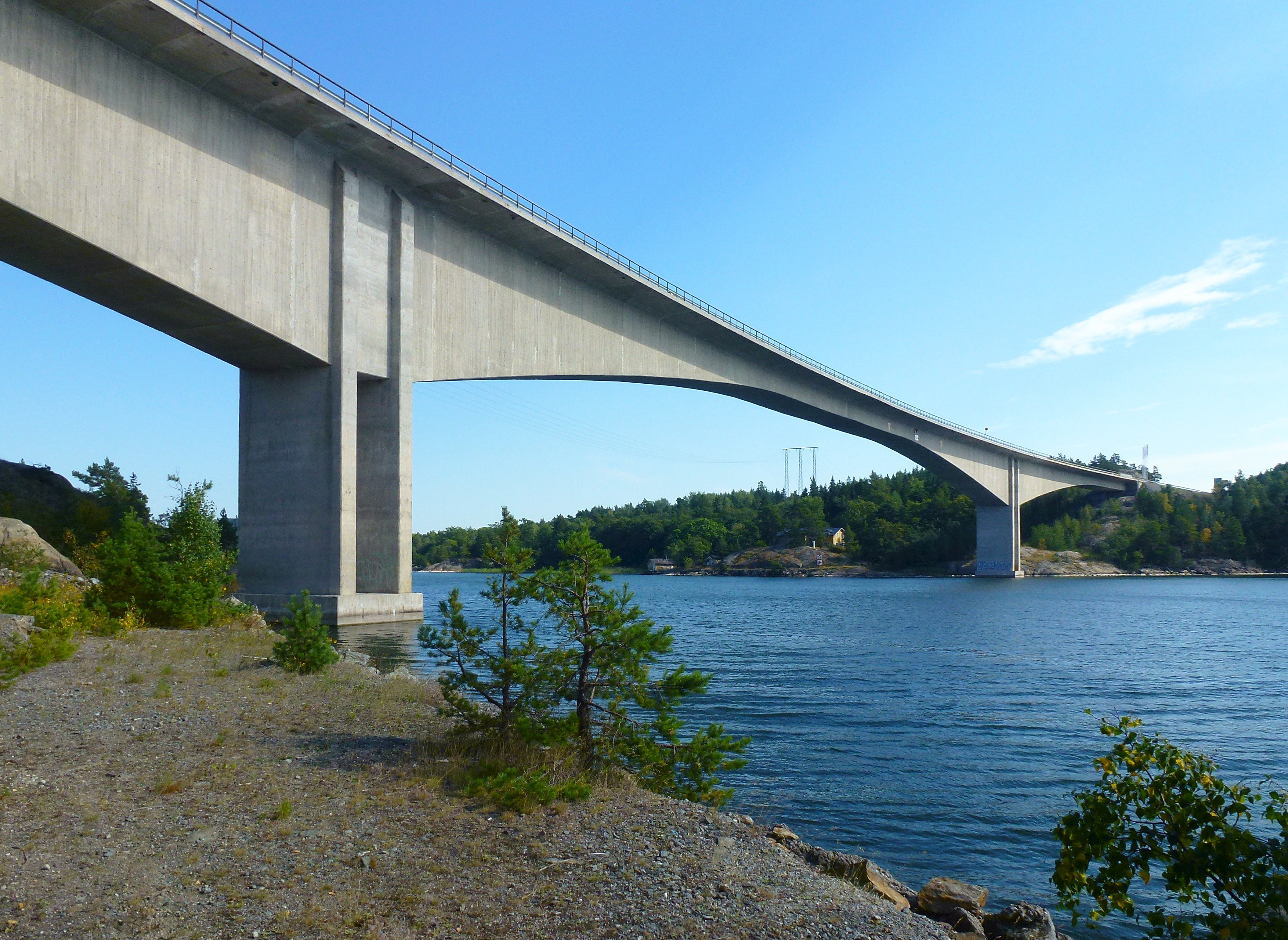 Farstabron från västra brofäste